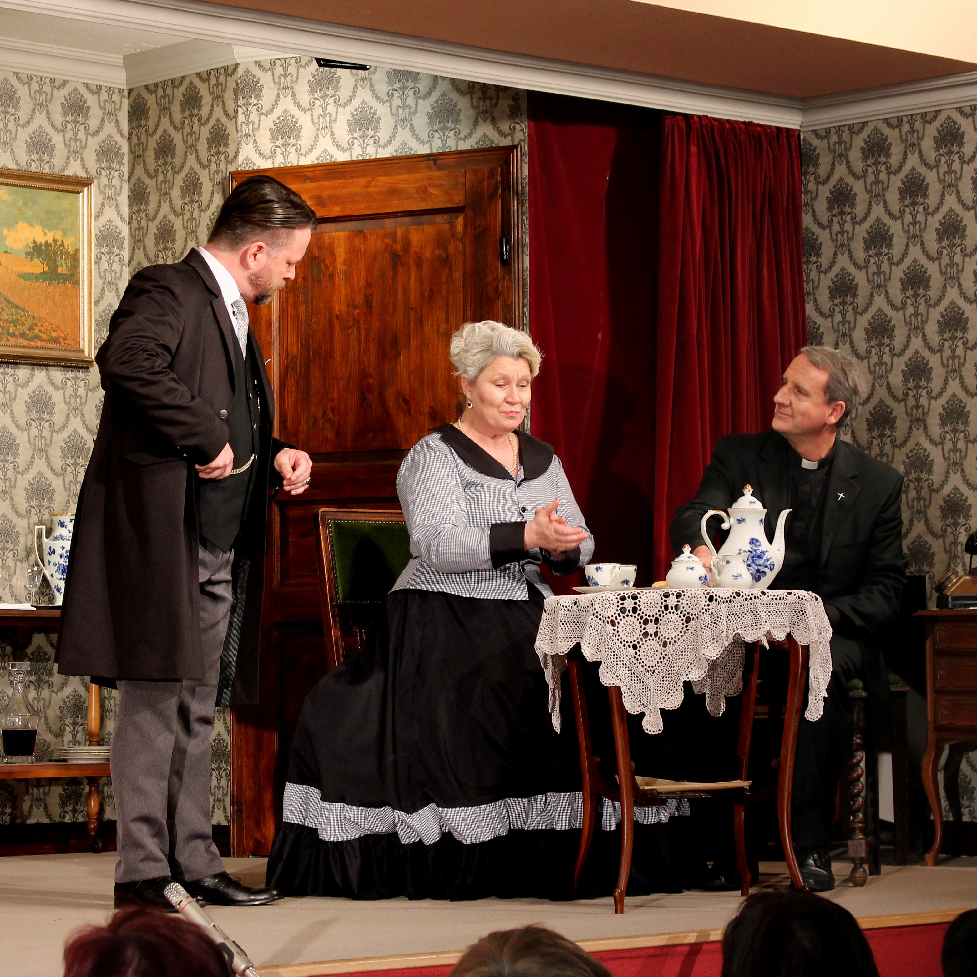 Arsen und Spitzenhäubchen, Aufführung der Kolping-Theatergruppe Kärlich, Szene: Pastor Dr. Harper ist gern bei den Brewsters zu Gast